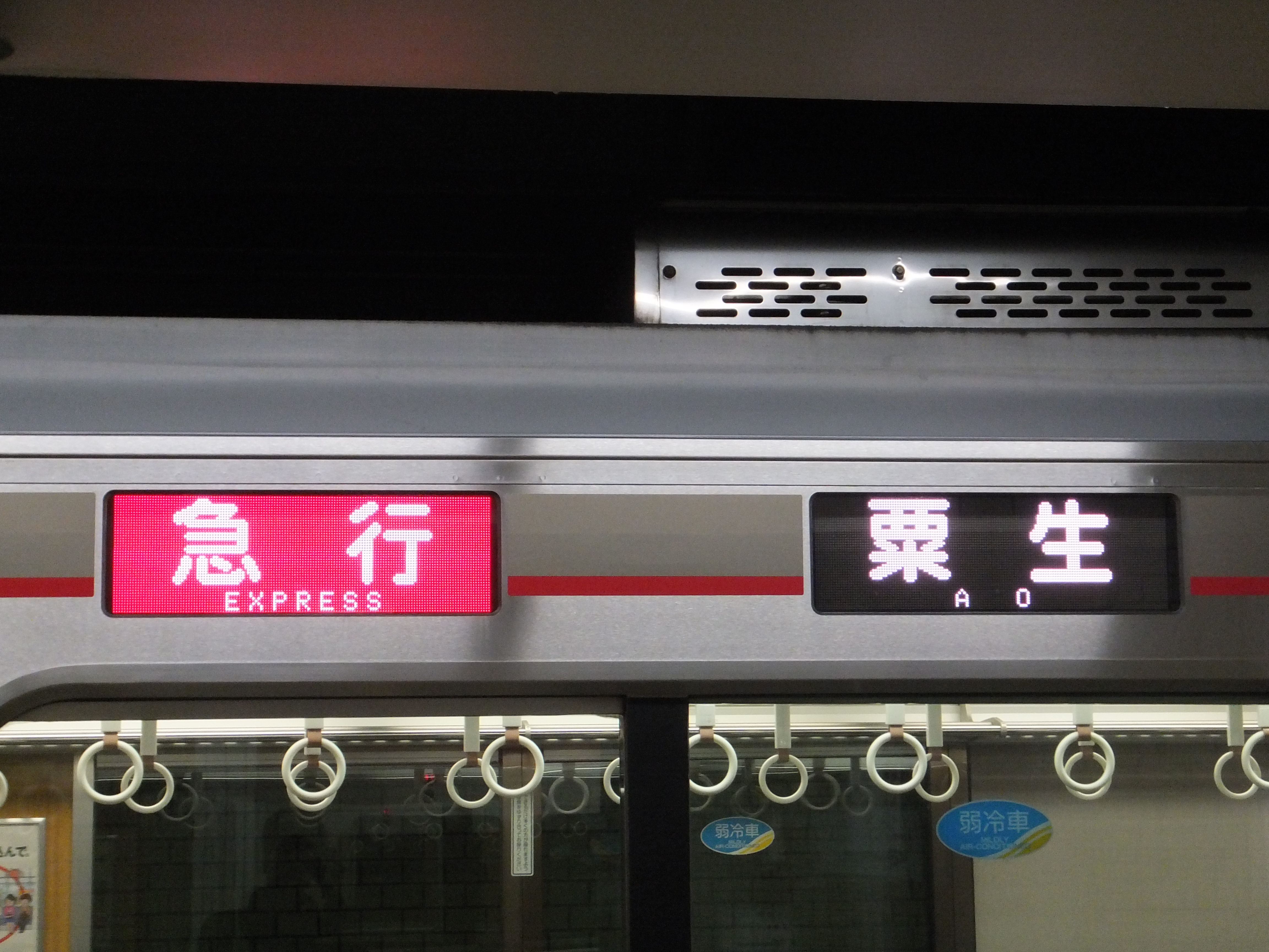 6000系の側面表示幕（種別、行先）